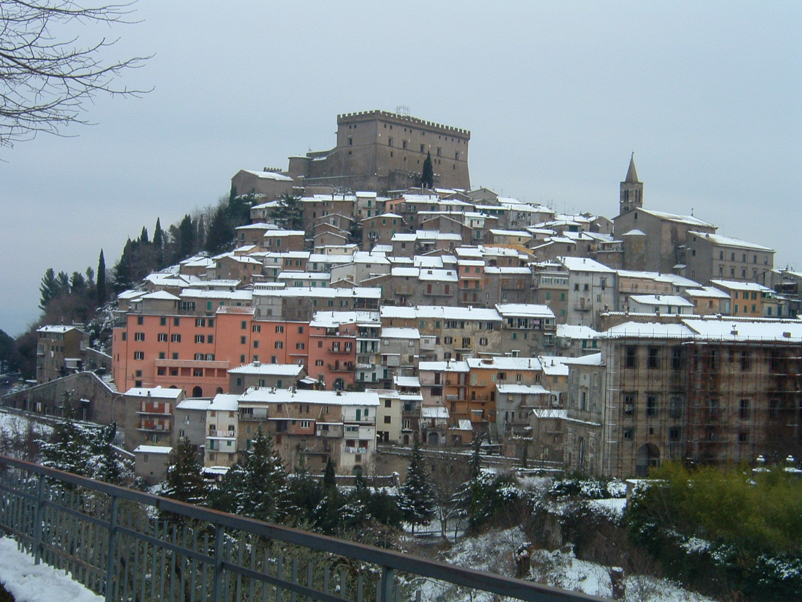 Veduta di Soriano nel Cimino nel mese di gennaio 2005 E' una foto scattata da me